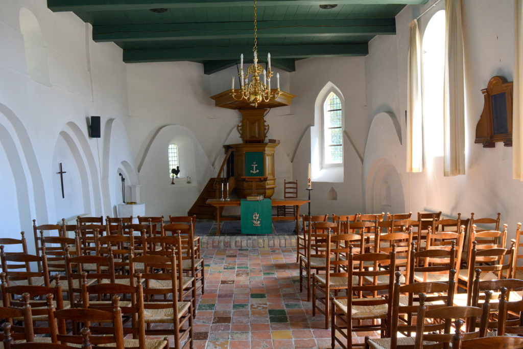 Katarinatsjerke, Leons, ynterieur